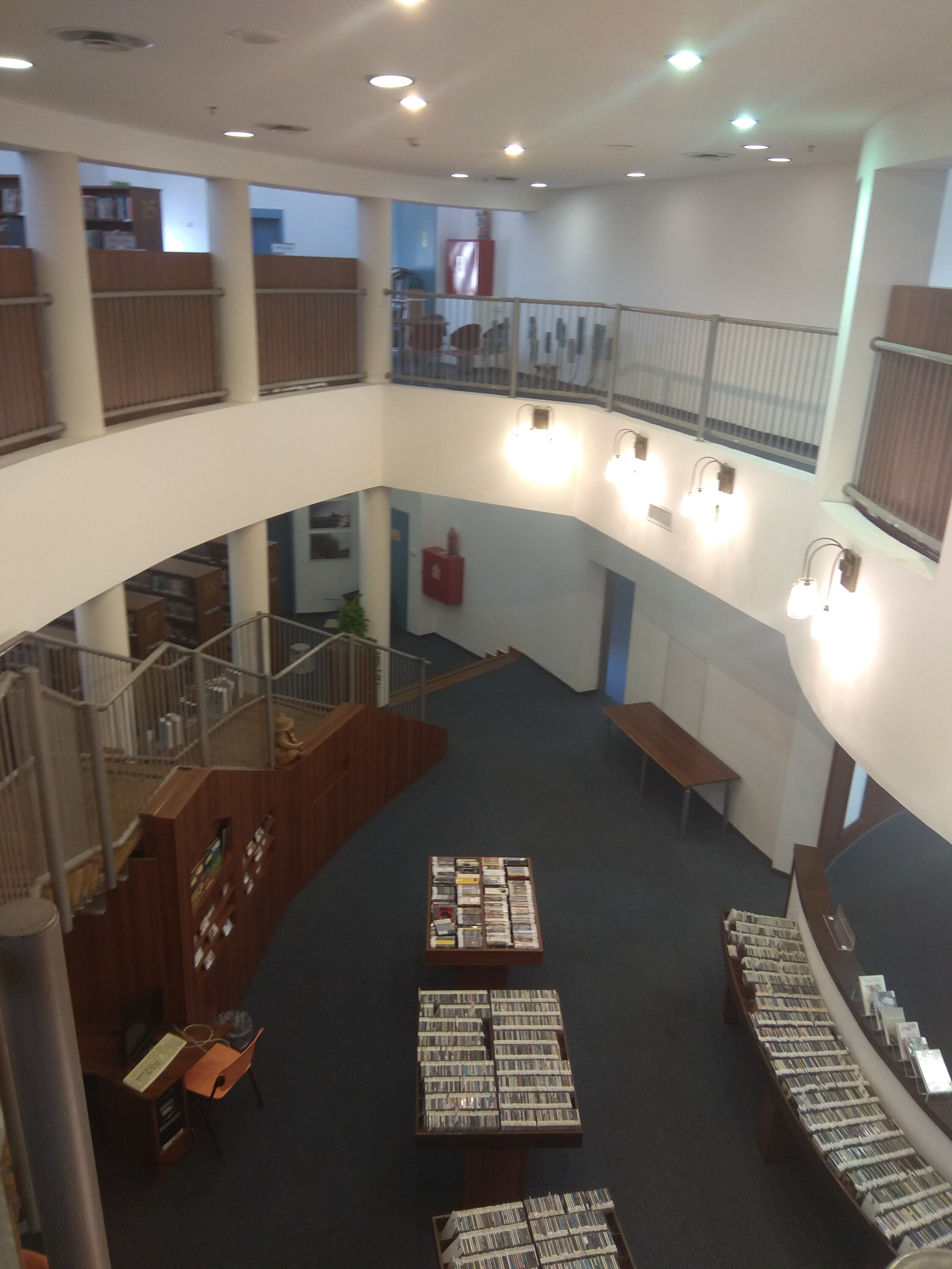 ספריית קריית ים